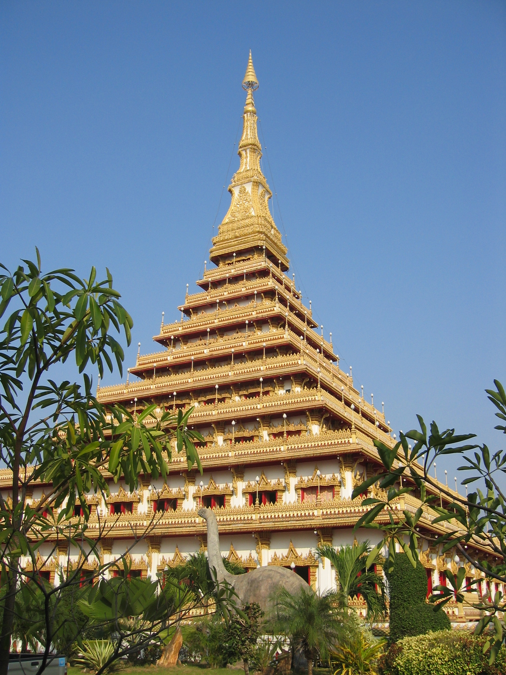 Phra Mahathat Kaen Nakhon 9-stöckige Stupa bei Khon Kaen Thailand